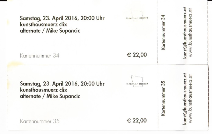 Eintrittskarten zu einem Kabarett von Mike Supancic am 23. April 2016 in Mürzzuschlag